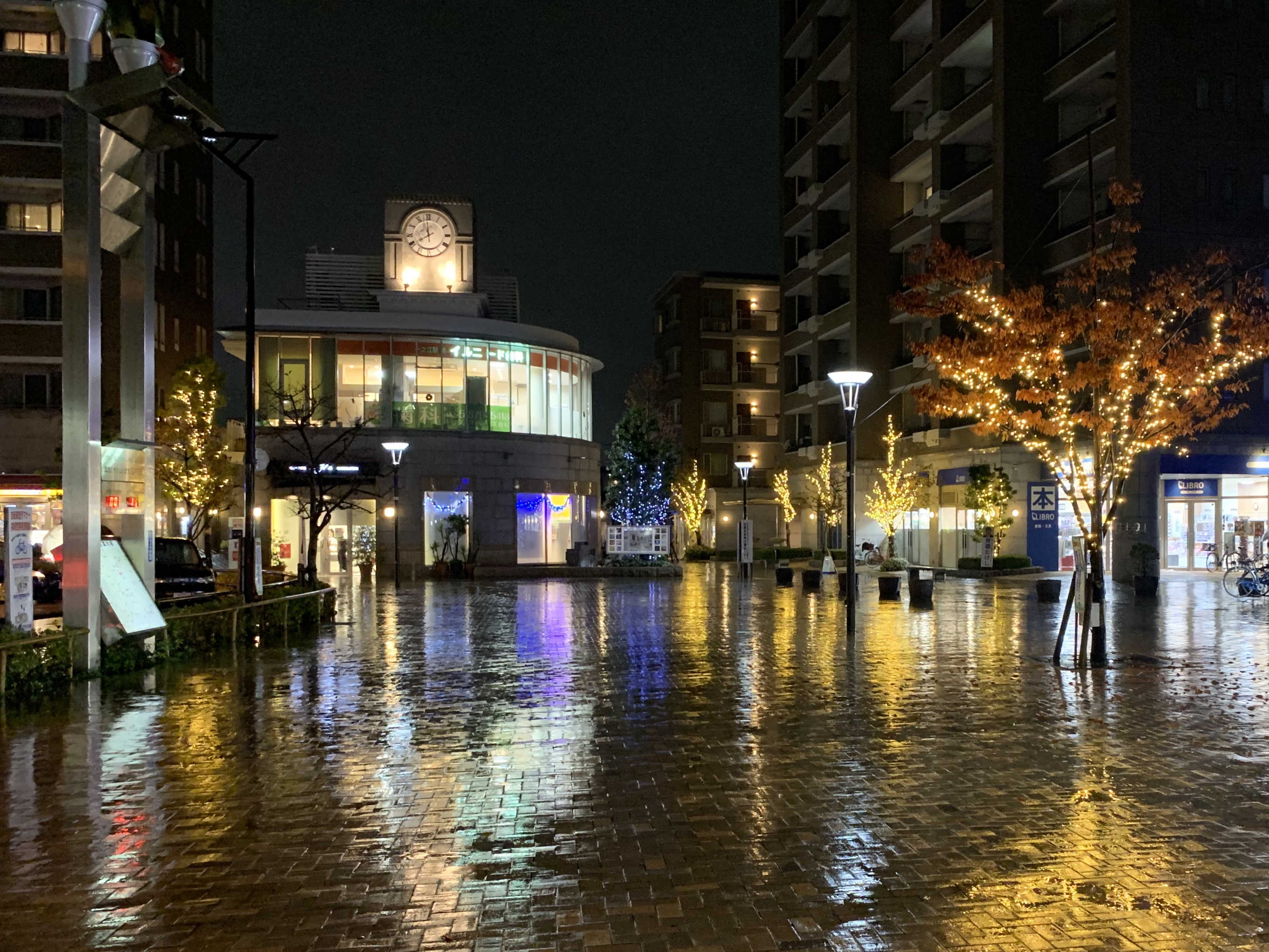 一之江駅A1,A0出口付近から西方向を望む